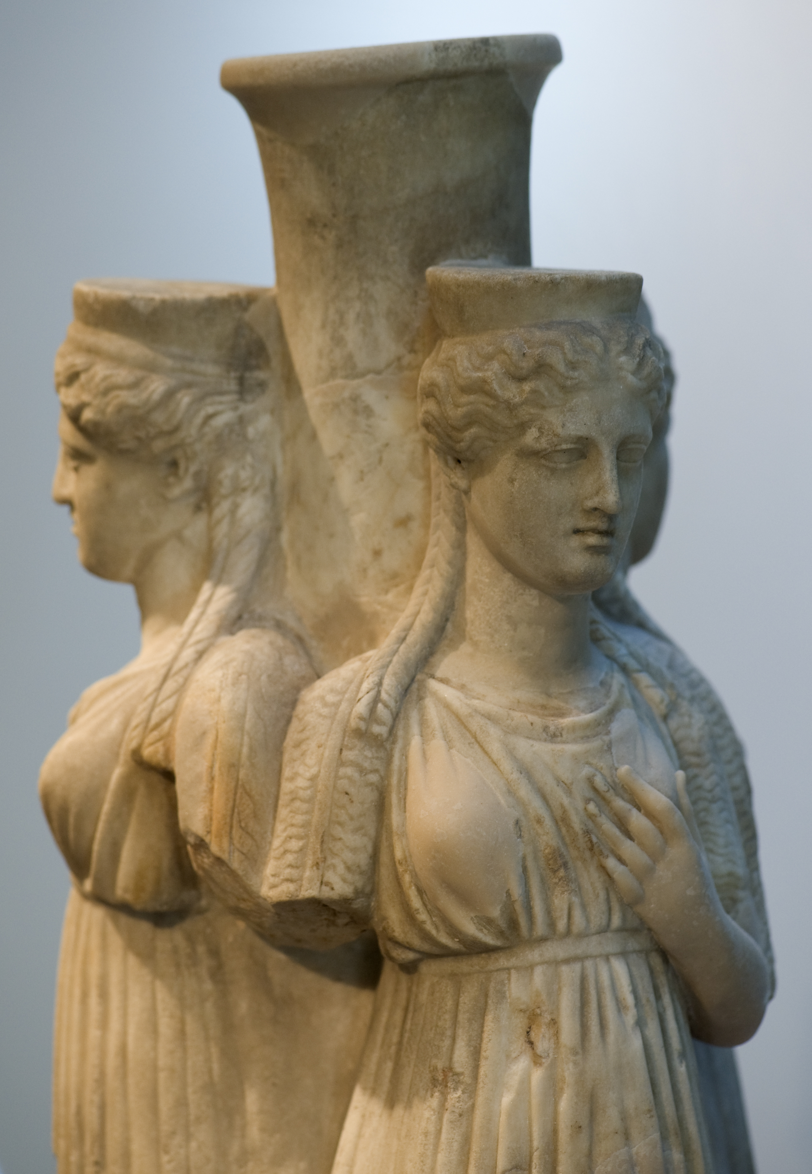 Beeld van godin Hekate Hekate